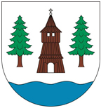 Herb gminy Rudziniec • Coat of arms of gmina Rudziniec